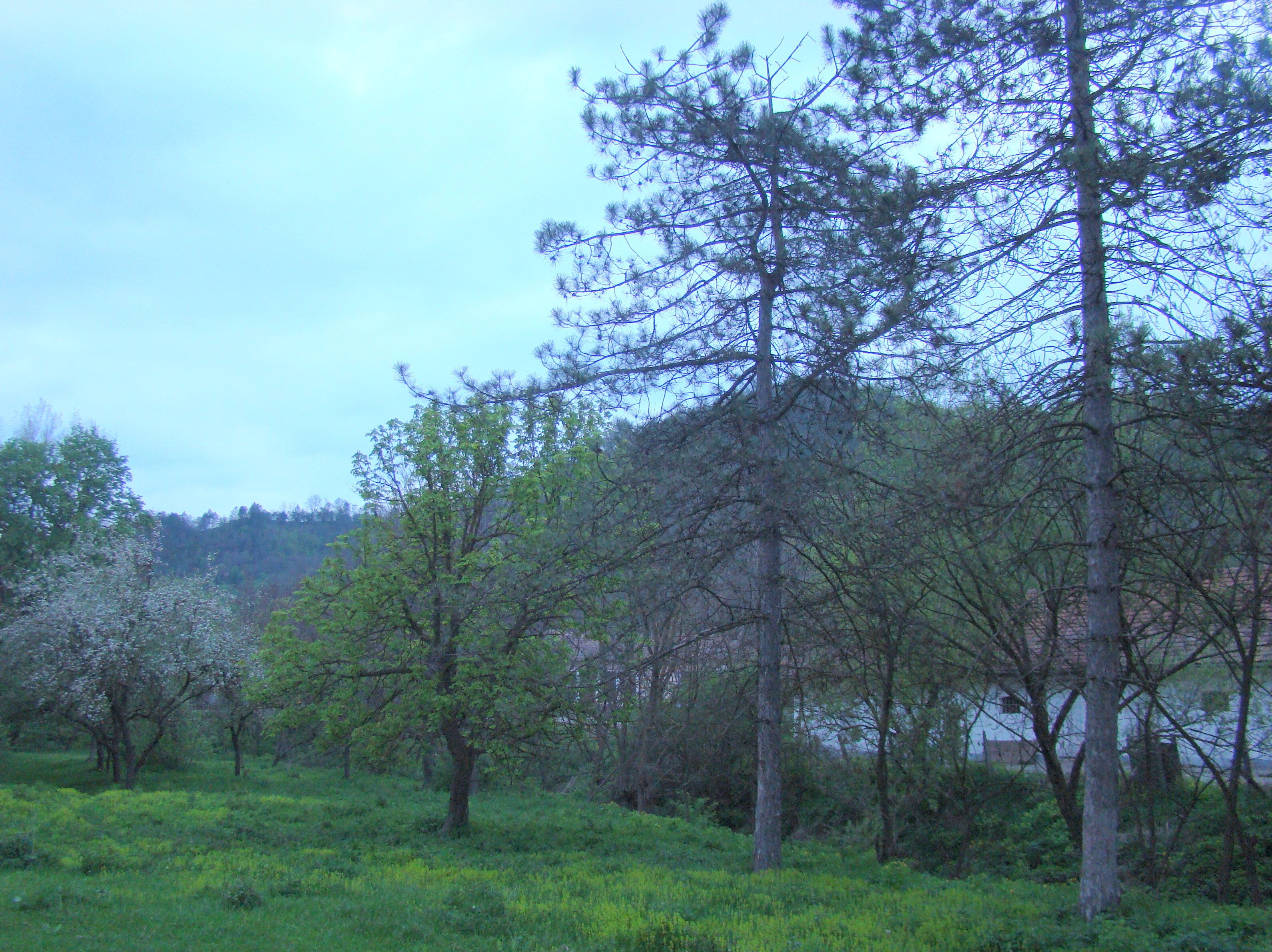 Parcul castelului Bethlen 03